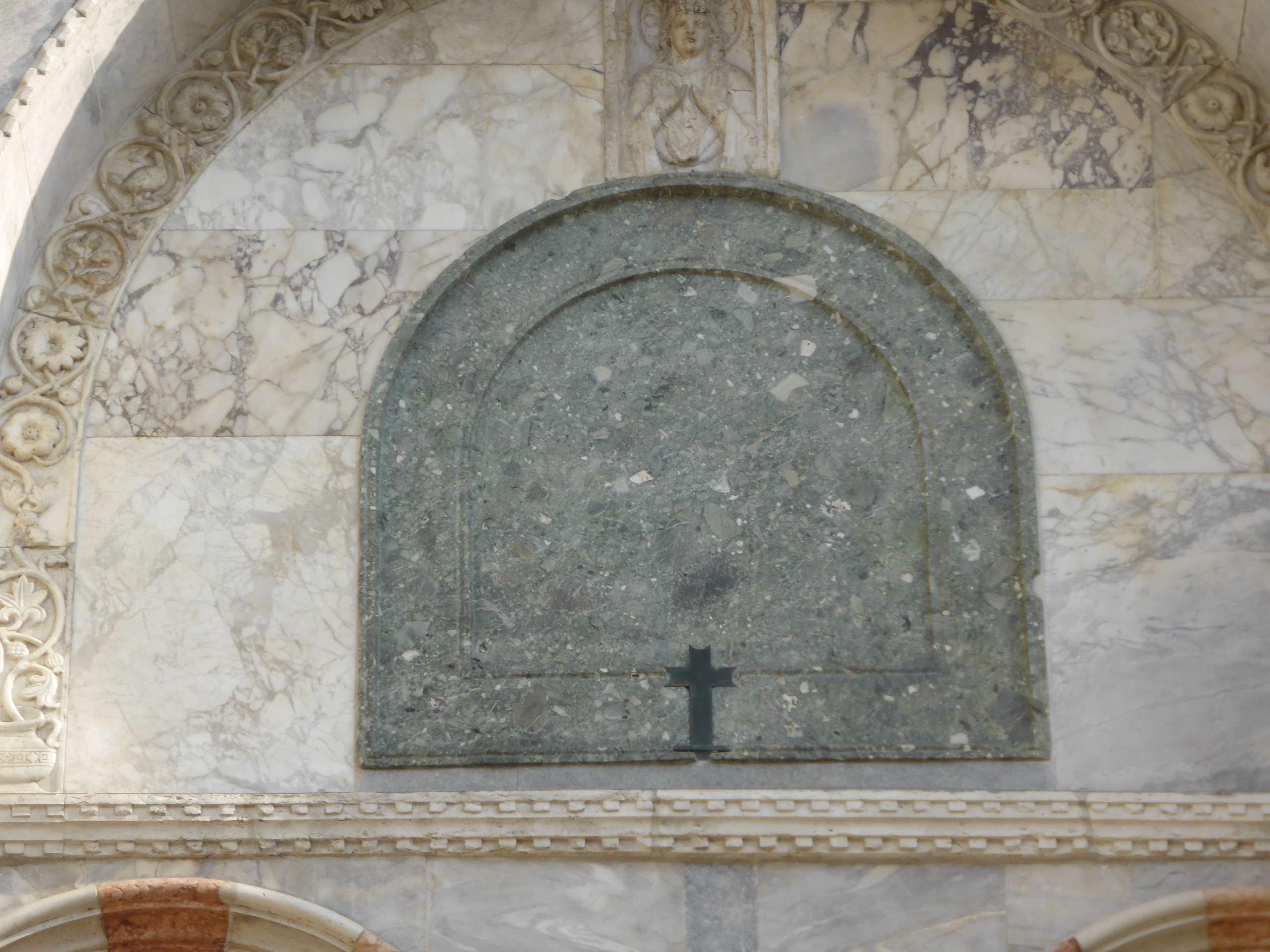 Spolie, byzantinische Altarplatte (Nordfassade)